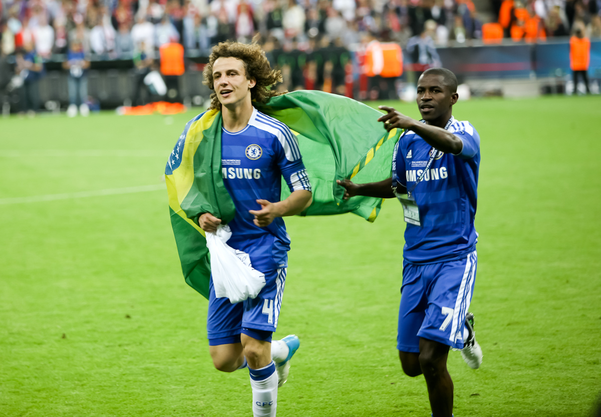 RA1_6498